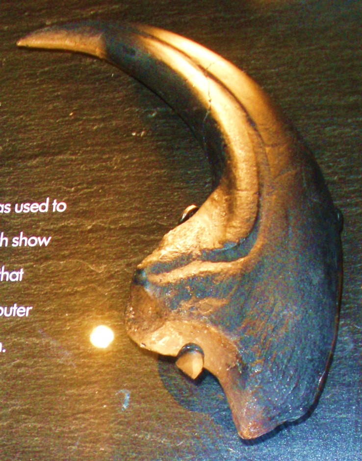 Fossil of Torvosaurus, an extinct dinosaur-- Took the photo at Natural History Museum, London